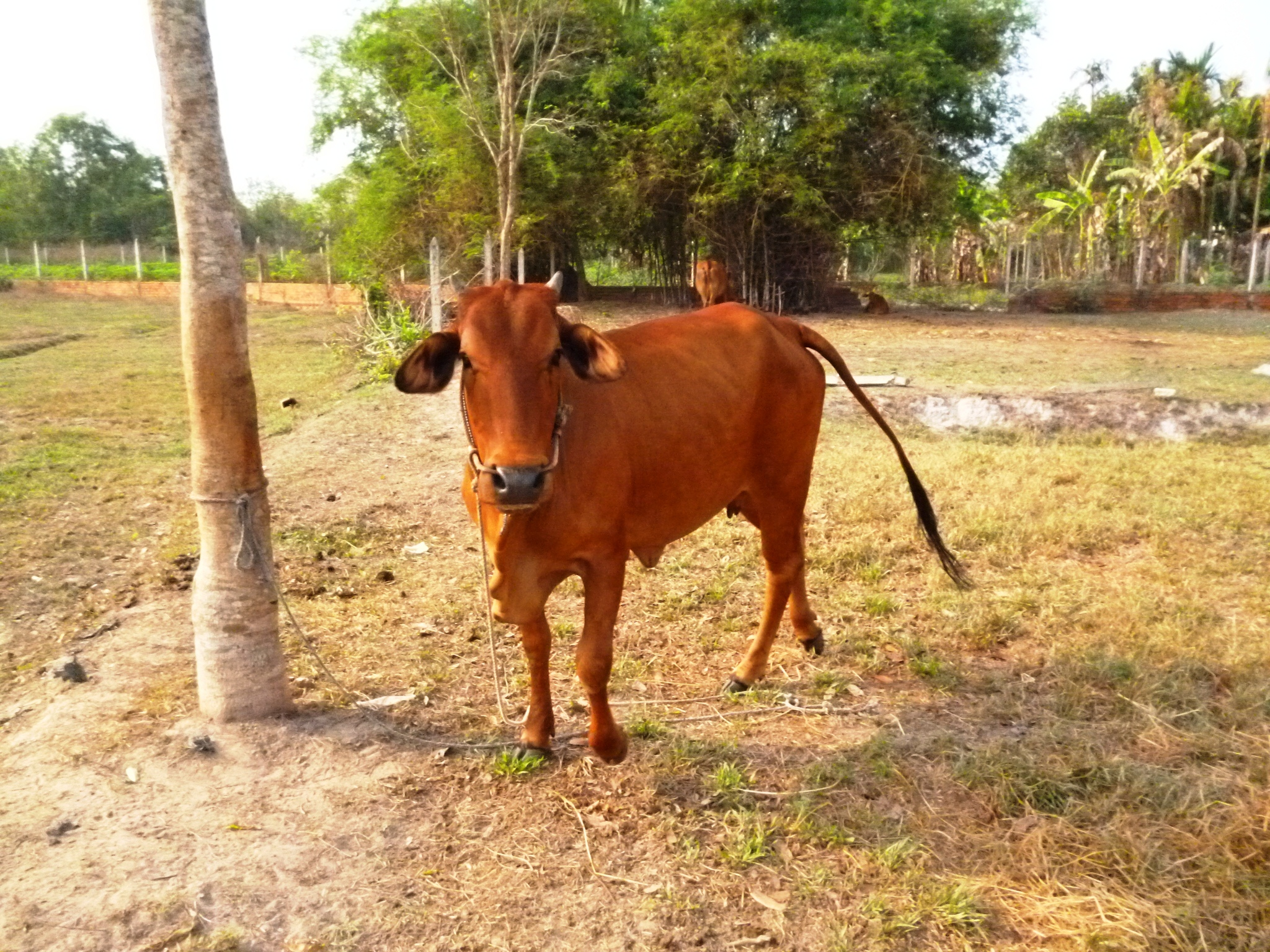 Hình chụp một con bò tơ ở Củ Chi vào tháng 4/2014 bằng máy ảnh cá nhân rồi sau đó úp lên Wiki (đã cắt bớt ngoại cảnh)